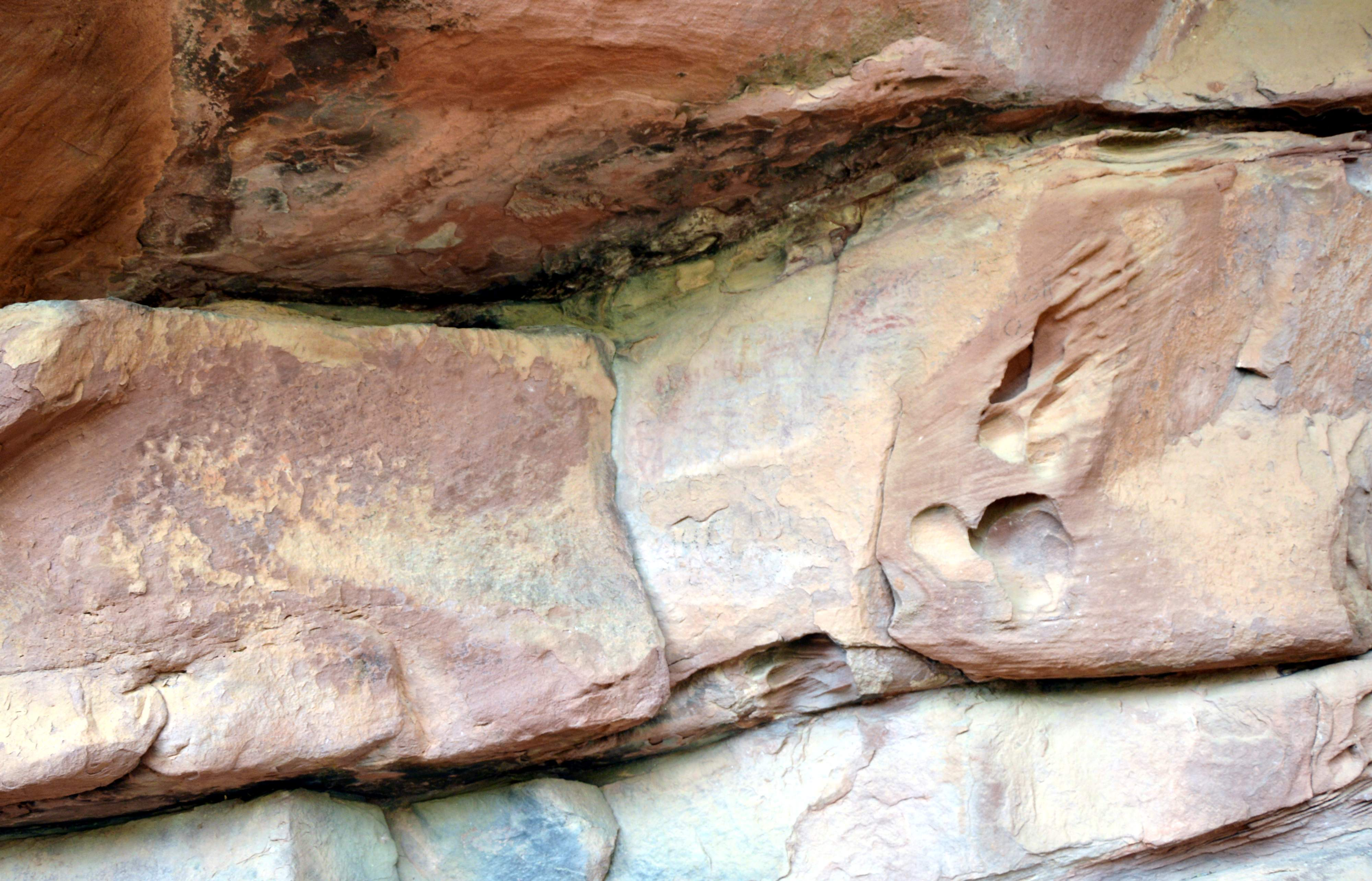 Detalle de panel decorado en el Abrigo de Prados de los Arejos II, Rodeno de Tormón, Parque Cultural de Albarracín (2018).